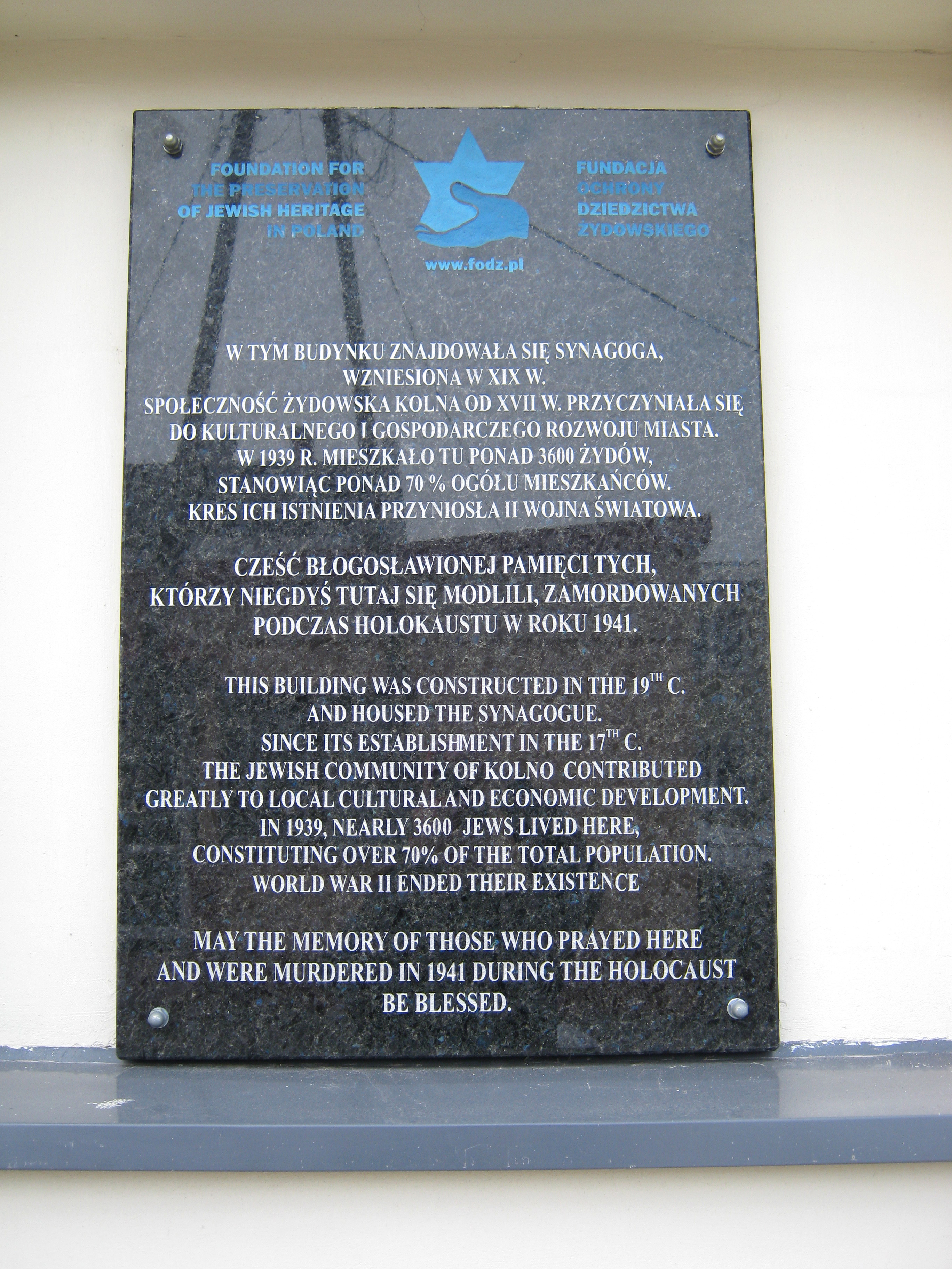 Synagoga w Kolnie - tablica informacyjna, pamiątkowa